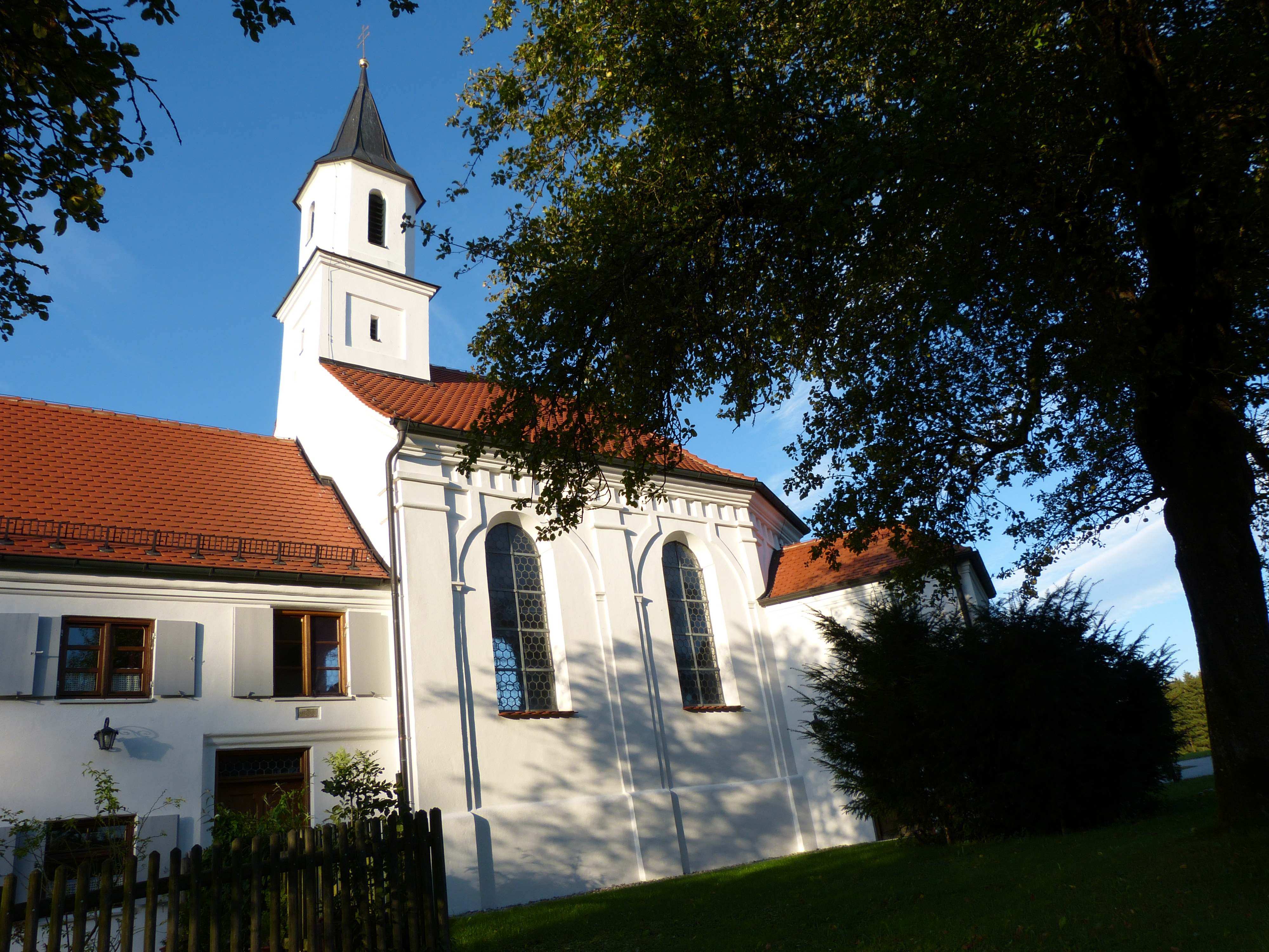 Kapelle Unseres Herren Ruh, Herretshofen, Kirchhaslach, Landkreis Unterallgäu, BayernThis is a photograph of an architectural monument.